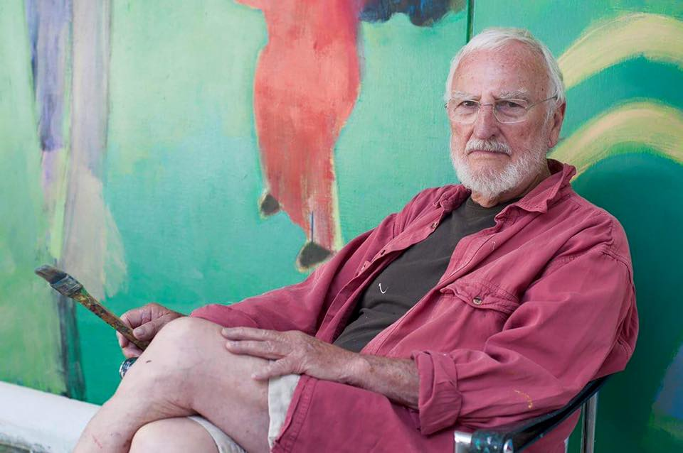 Arne Haugen Sørensen Foto: Amanda Arancibia Haugen Sørensen